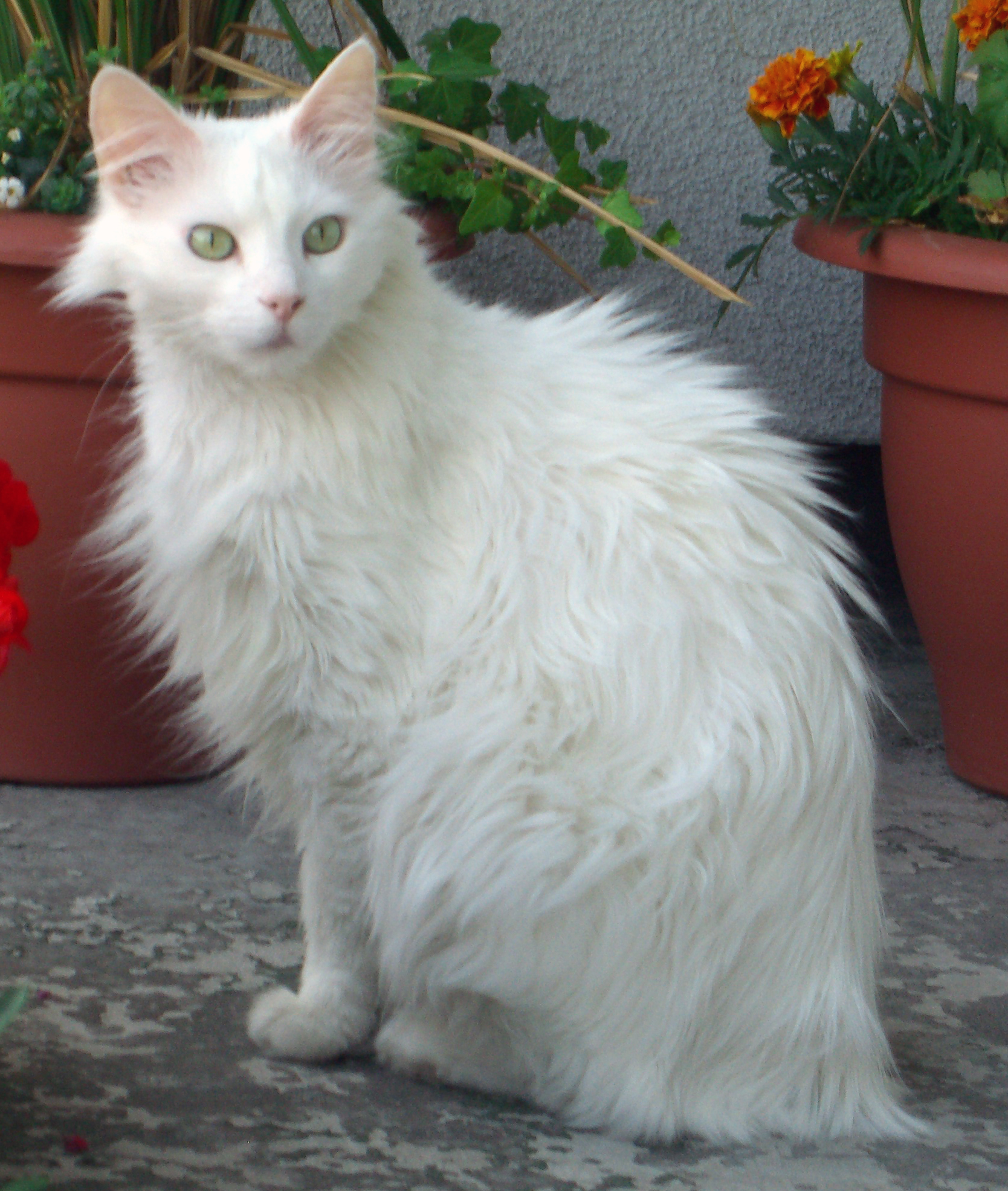 eigen gemaakte foto